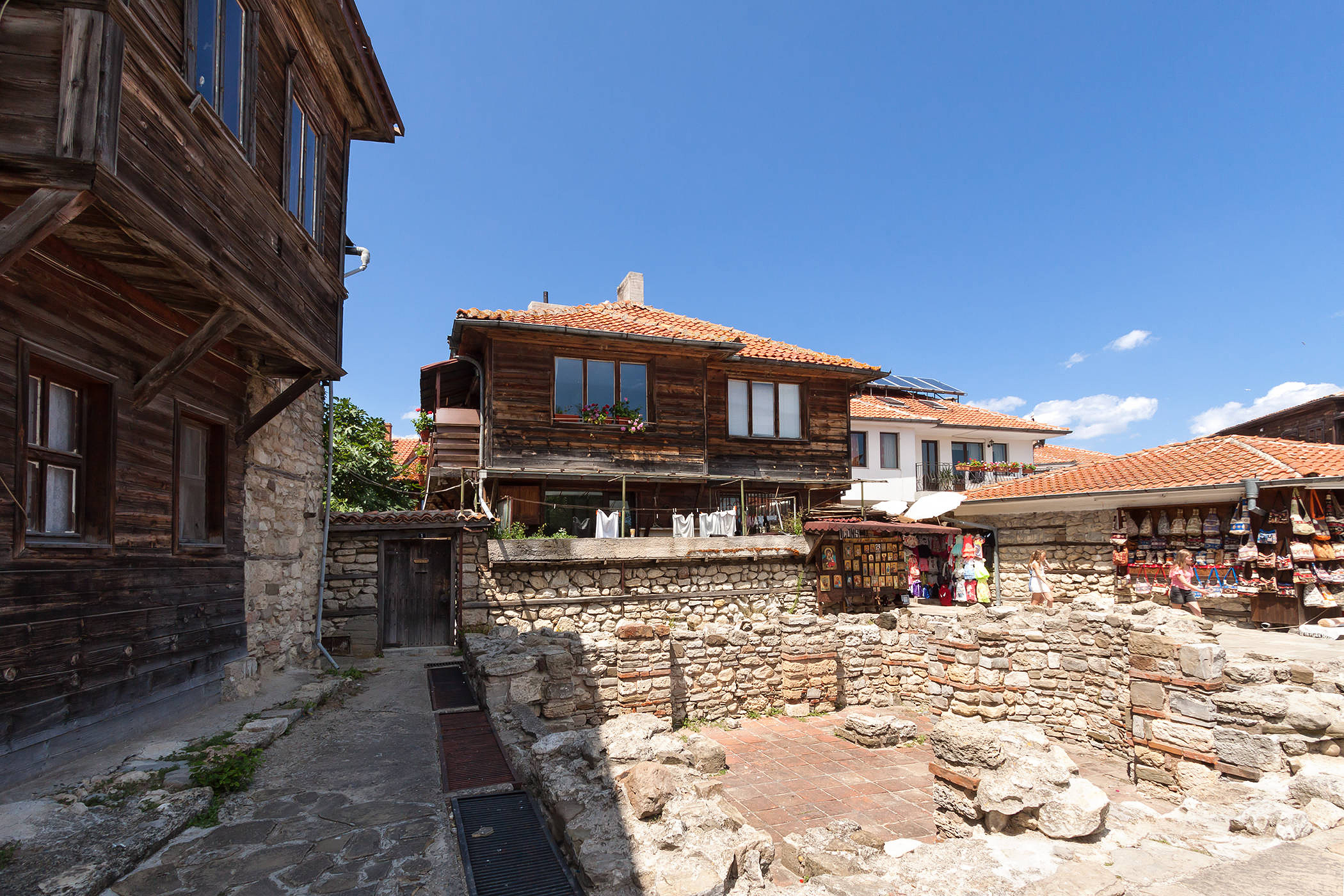 Несебыр. Руины церкви Св Дмитрия у Старой митрополии.